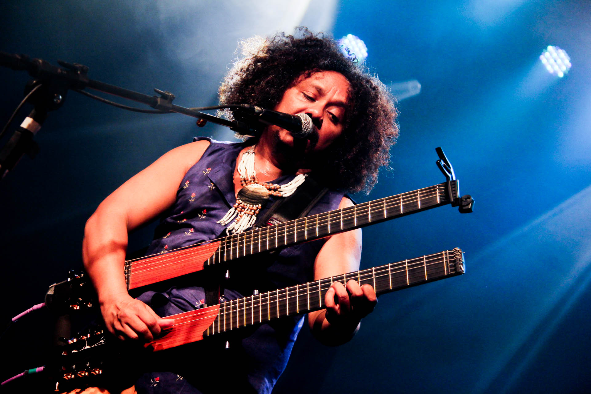 Chico Cesar-60